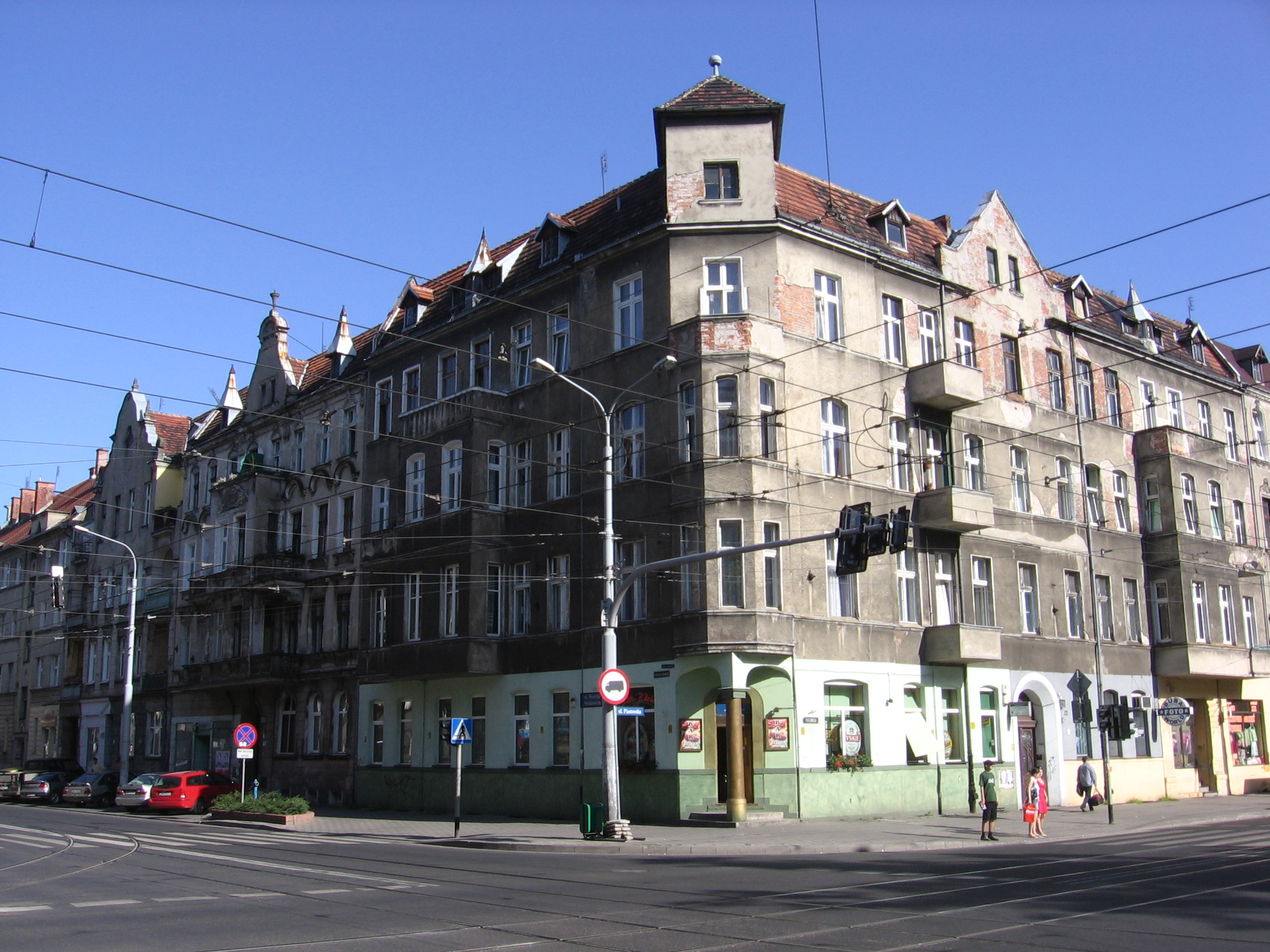 ulica Sienkiewicza (w lewo), skrzyżowanie z Piastowską (w prawo): bar Kleks na rogu w kamienicy ze "Złotą Kolumną"